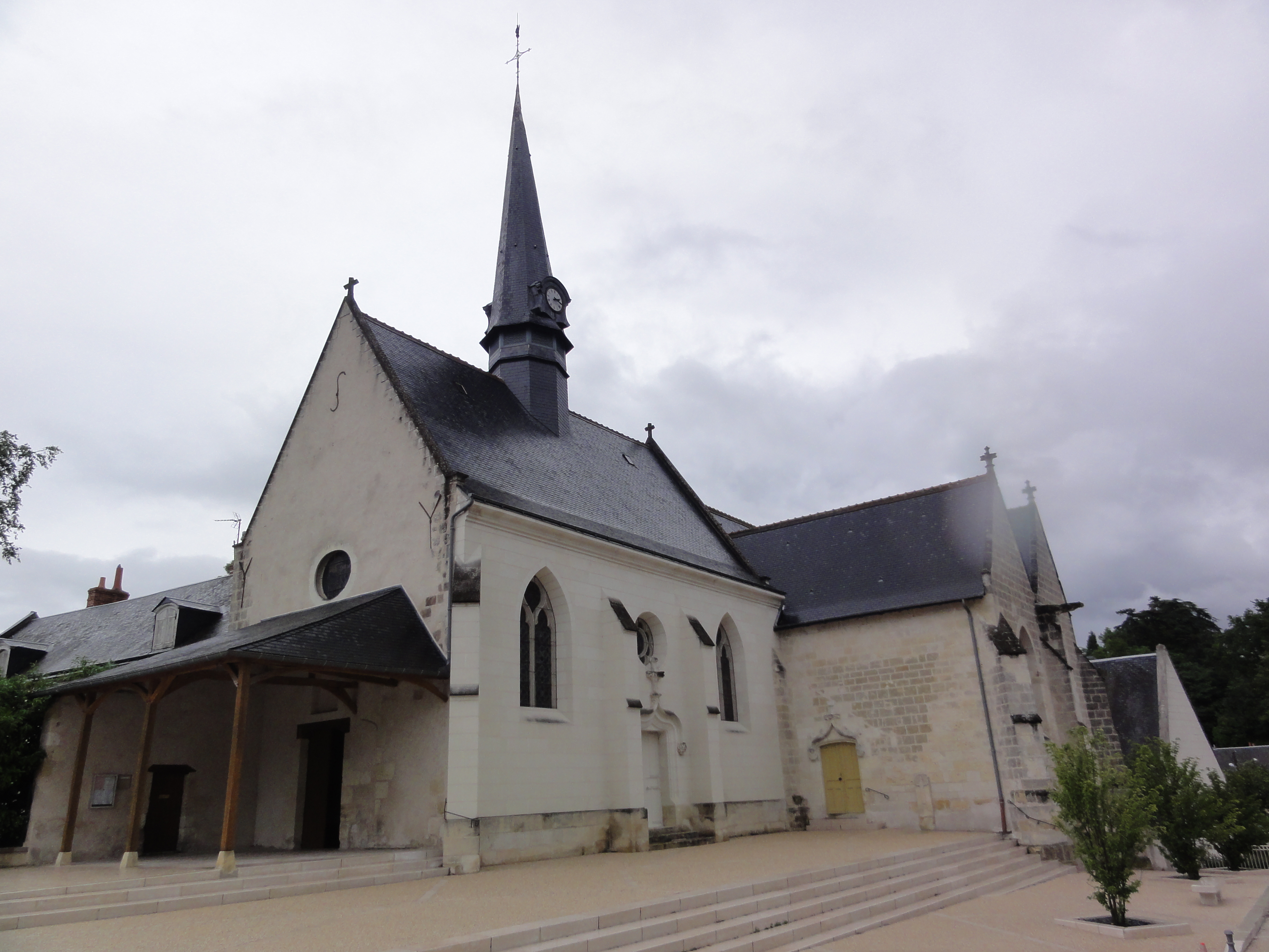 Saint-Avertin (Indre-et-Loire) Église